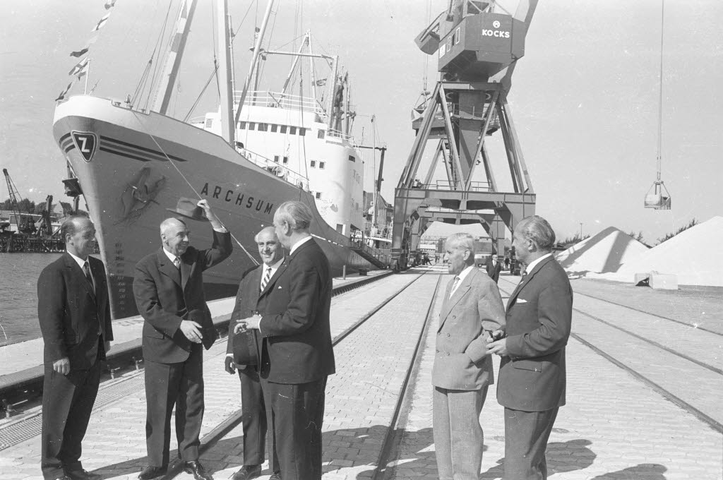 Oberbürgermeister Hans Müthling (2.v.l.) gratuliert Konsul und Reeder Thomas Entz (4.v.l.). Im Bild der Leitende Ministerialrat Fritz Bartel (1.v.l.) als Leiter der Abteilung Verkehr im Landeswirtschaftsministerium, Stadtrat Rudolf Renger (3.v.l.), Stadtrat Günther Schubert (5.v.l.) und Städtischer Baudirektor Werner Sauer. Im Hintergrund der Frachter ARCHSUM als erstes Schiff am neuen Verladekai.